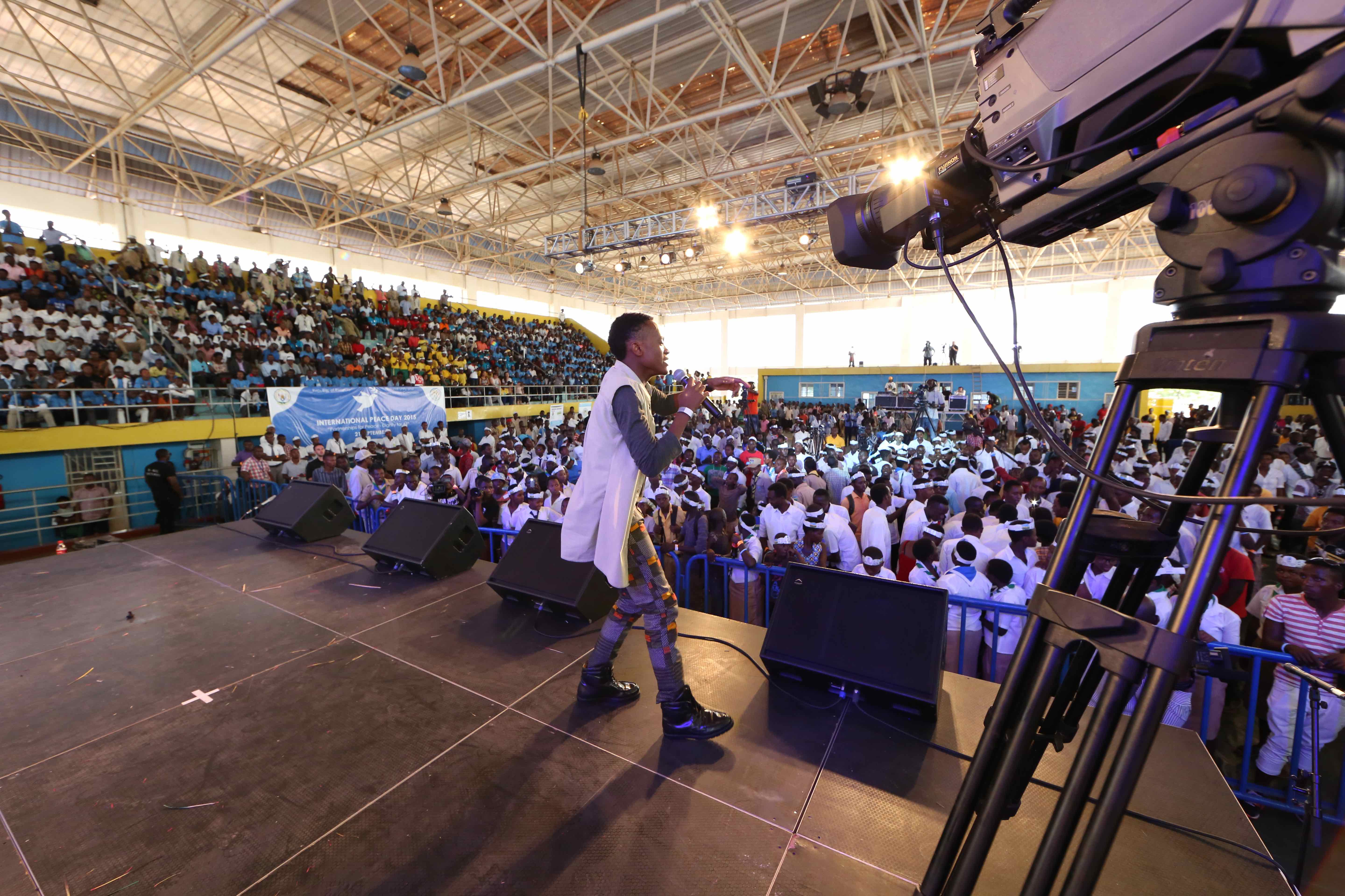 photo MONUSCO / Abel Kavanagh